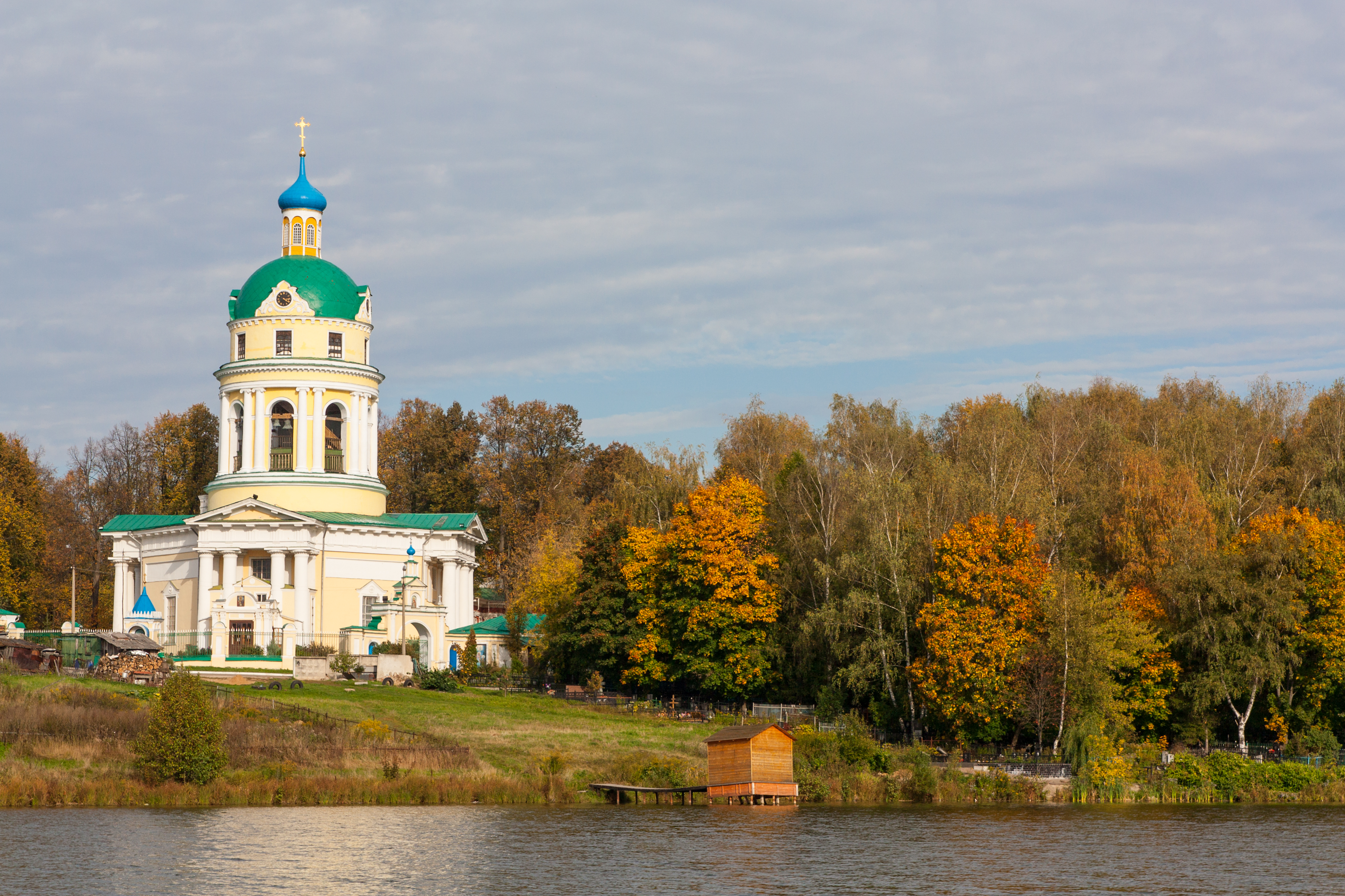 Вид на церковь Николая Чудотворца и Барские Пруды в селе Гребнево со стороны города Фрязино.